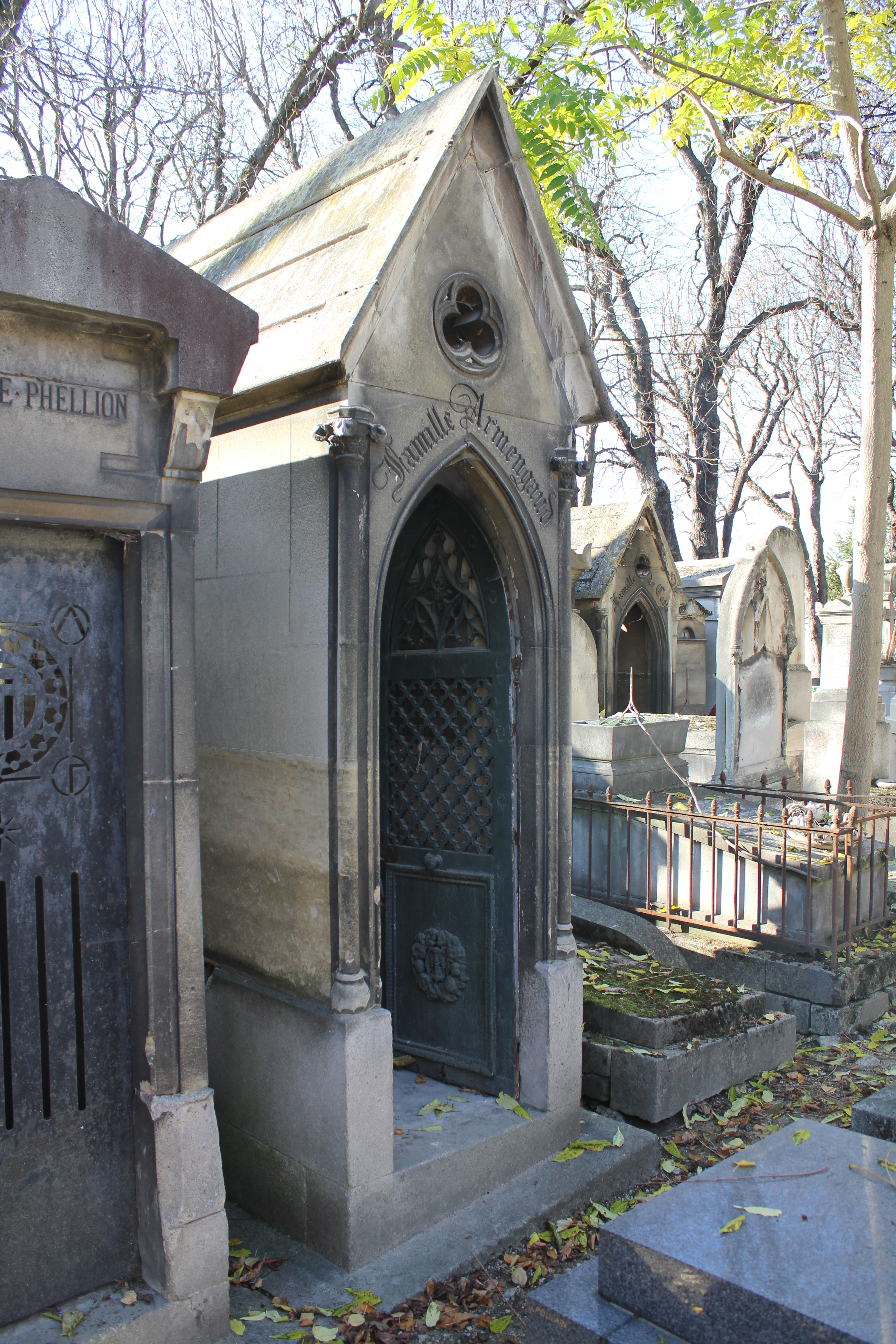 vue d'ensemble